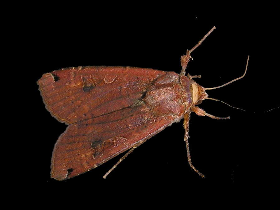 Noctua pronuba